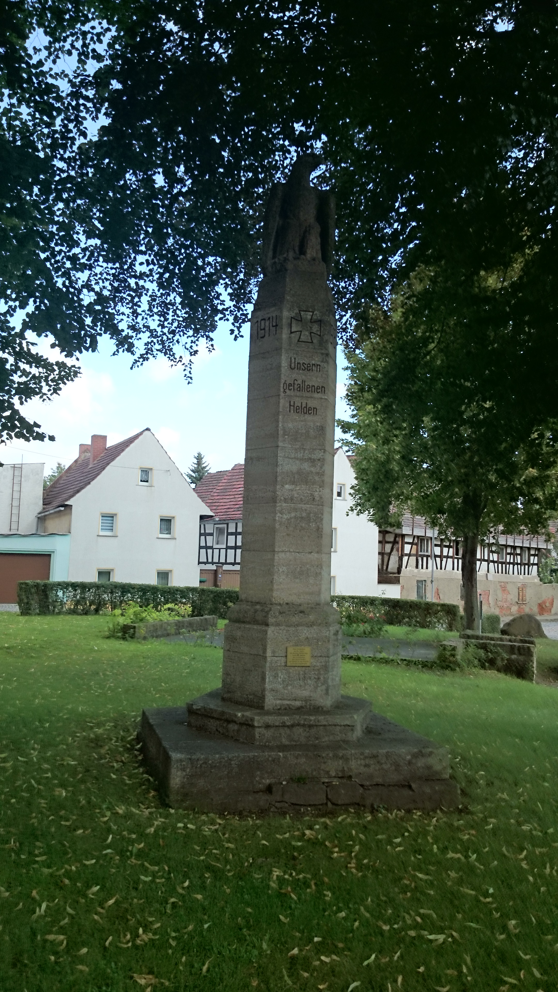 Gefallenendenkmal 1.Weltkrieg in Predel